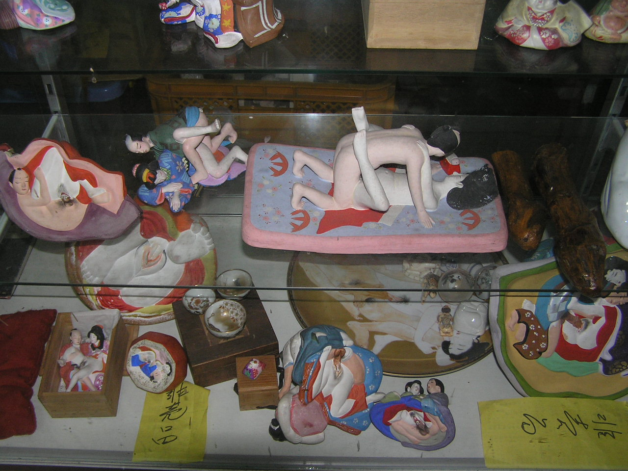 立川水仙郷パラダイスおもちゃ類